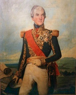 Le maréchal Guillaume Dode de la Brunerie